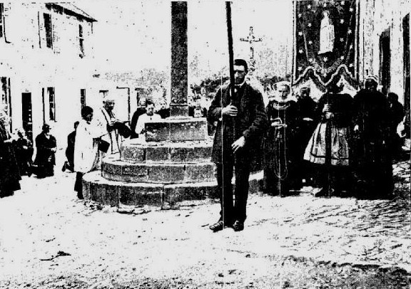 Procession à Landévennec dans le département français du Finistère en 1903